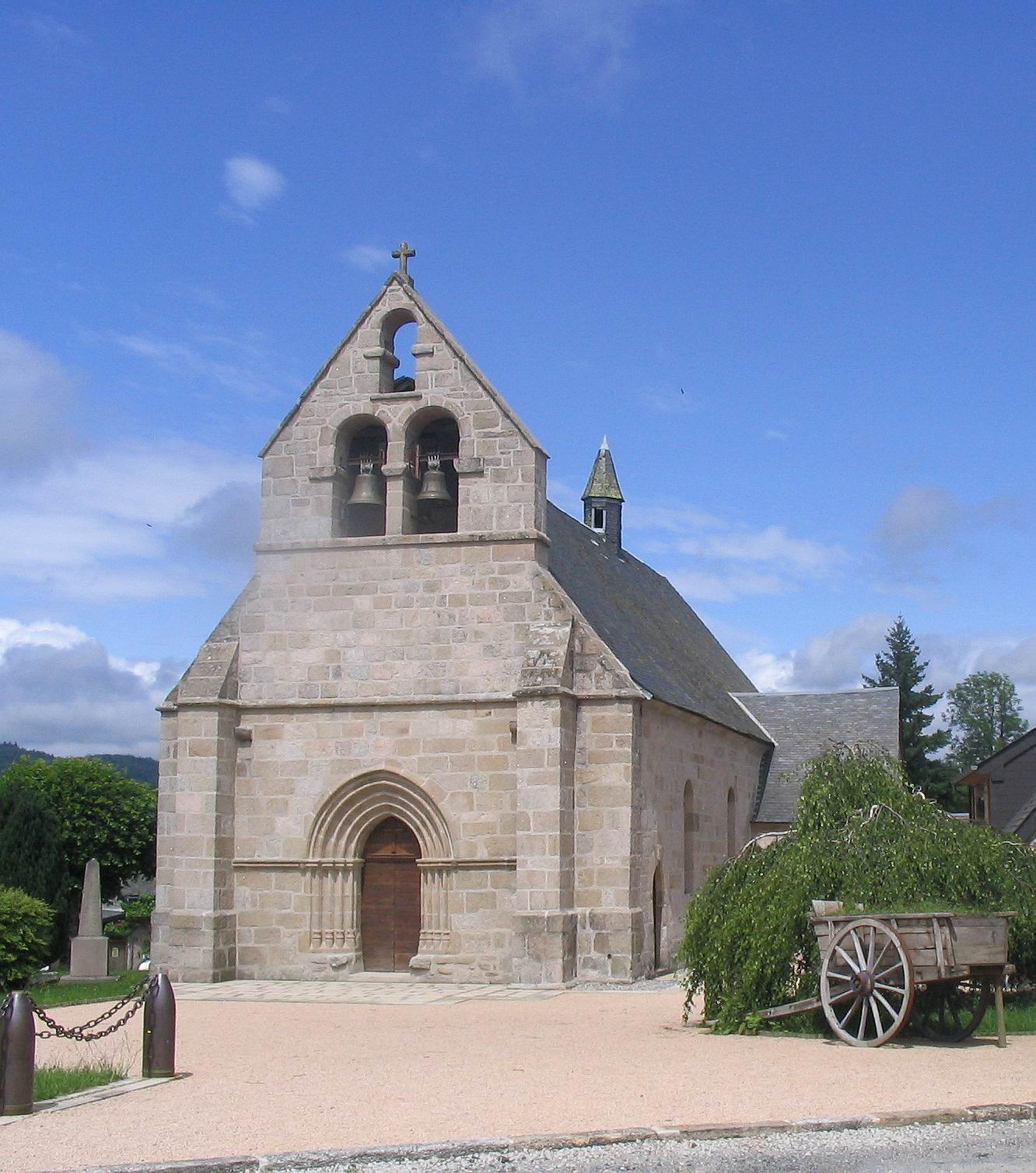 Eglise St Eloi-St Martin d'Ambrugeat (XIIéme et pan-clocher du XVIème)